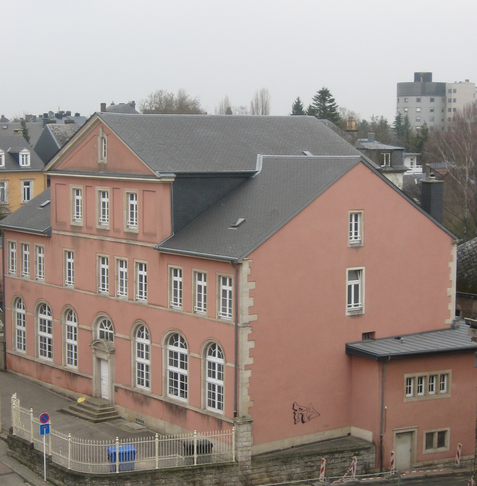 Den ale Meedercherslycée zu Esch-Uelzecht, am Schoulbierg.